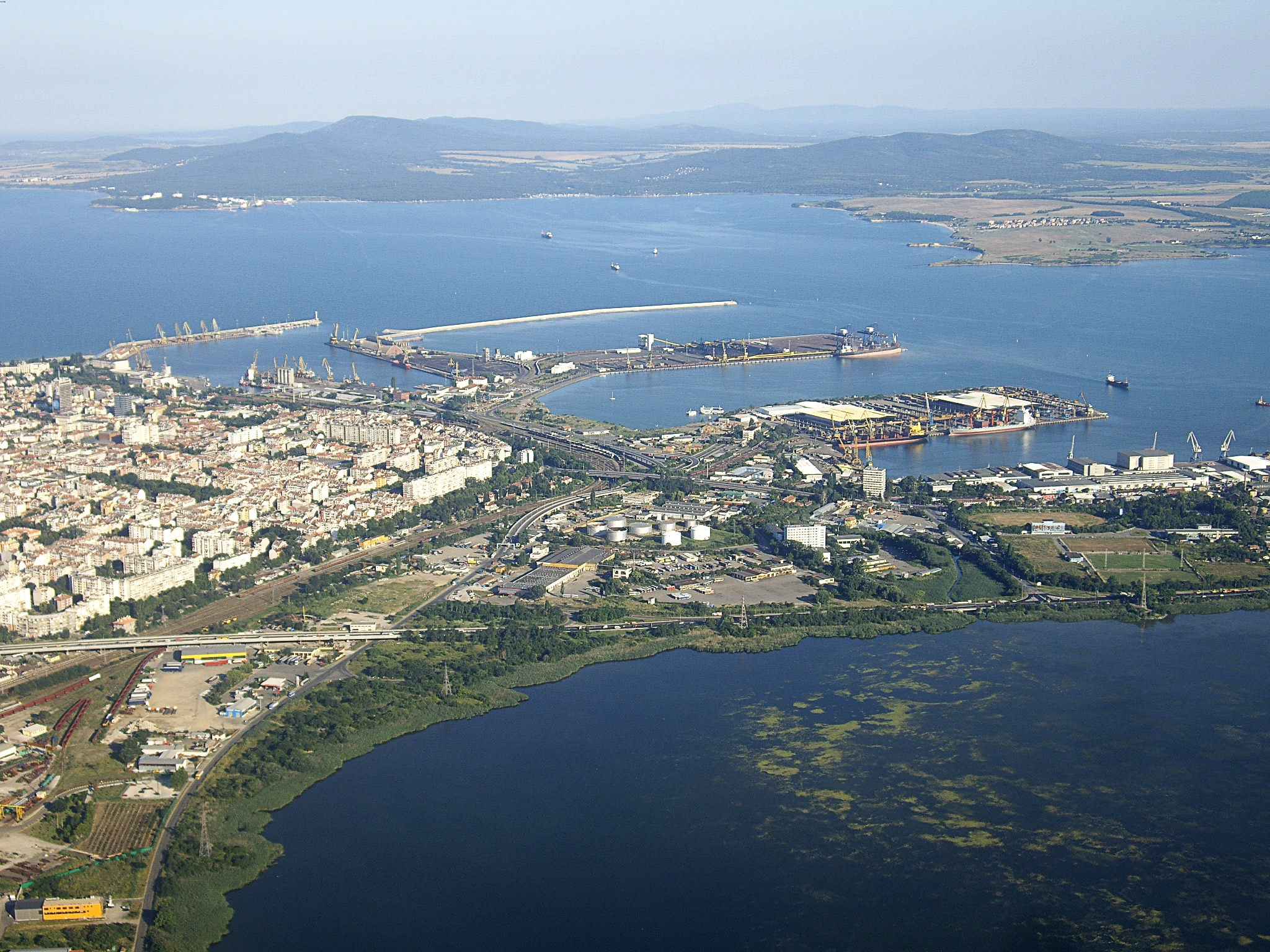 Burgas, Bulgarien: der Burgas-See im Vordergrund, dahinter die Industriezone Nord, der Hafenkomplex und links davon der Stadtteil Wasraschdane und das Stadtzentrum. Im Hintergrund das Schwarze Meer sowie das Strandscha-Gebirge mit dem Gipfel Bakarlak (362 m).